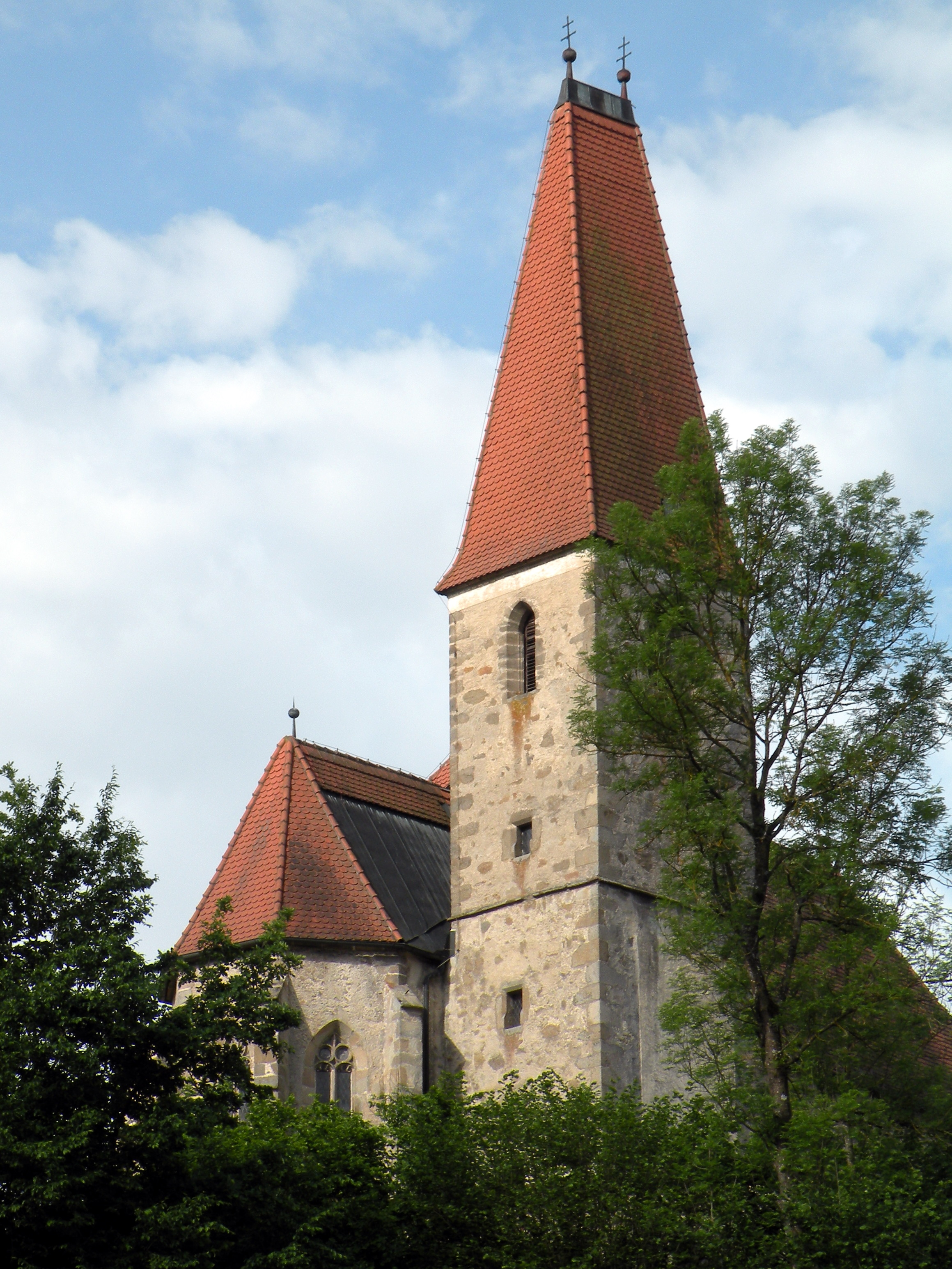 Ehemalige Pfarrkirche von Altenburg, Filialkirche der Pfarre Windhaag bei Perg